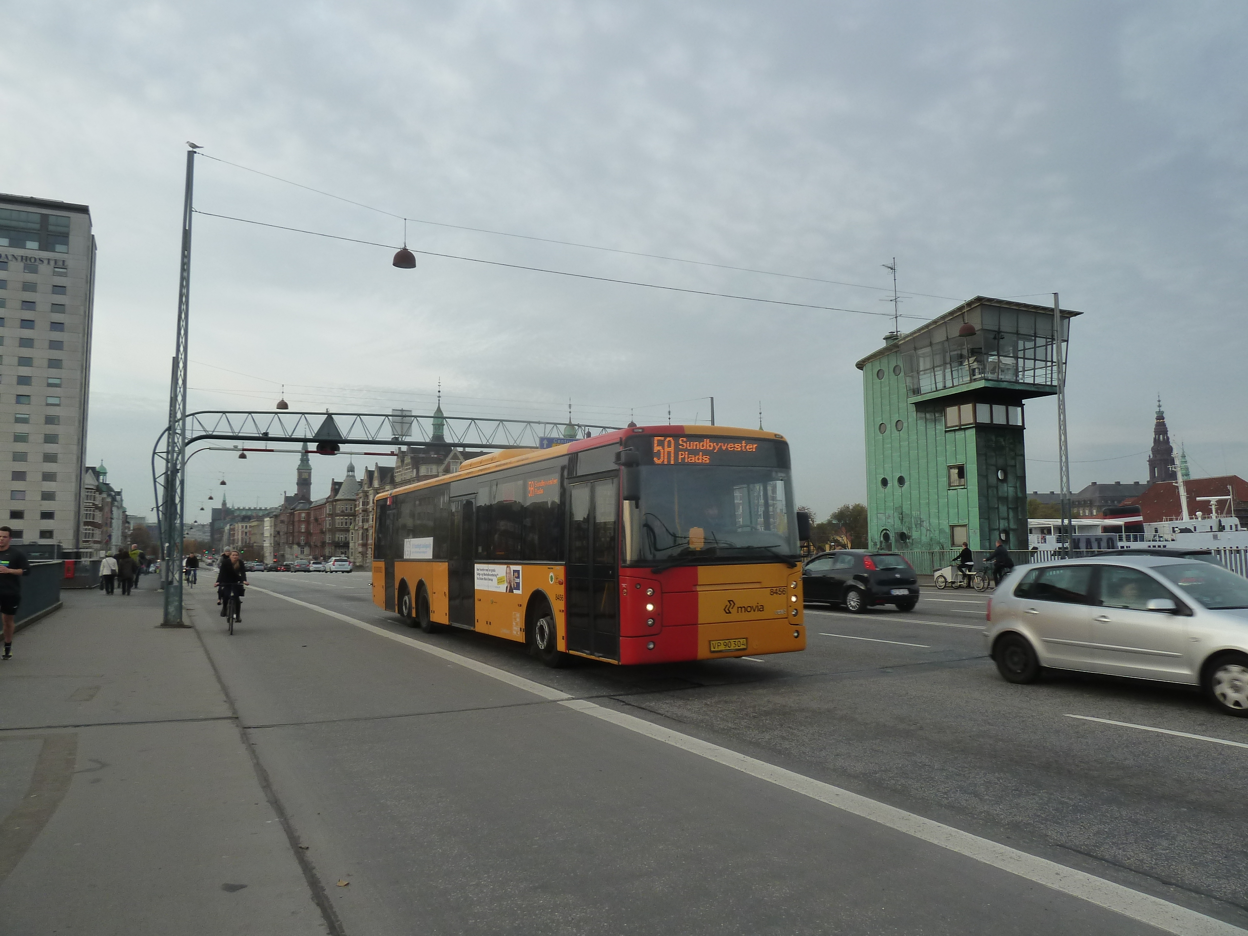 Movia bus line 5A on Langebro in Copenhagen.